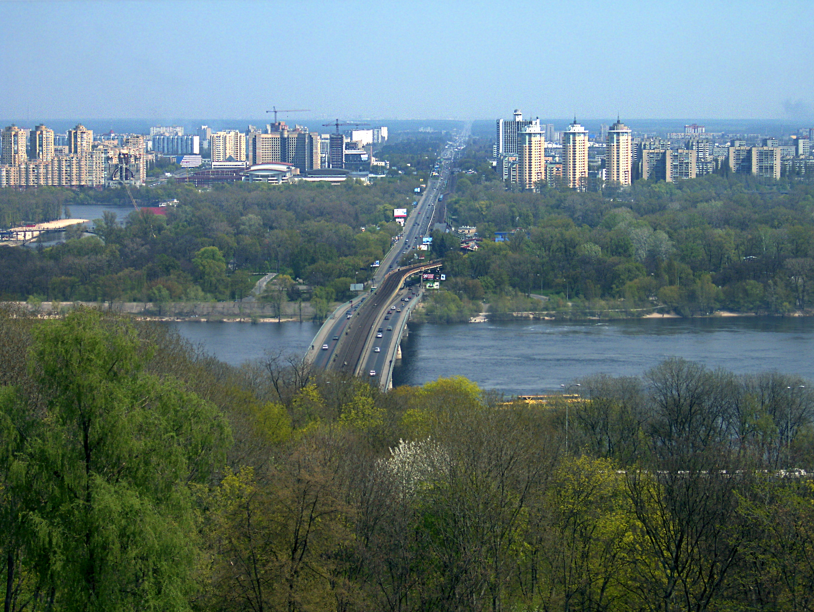 Blick von der City Kiew über den Dnjepr nach Darnitzki (Osten) andere Versionen: keine anderen Versionen